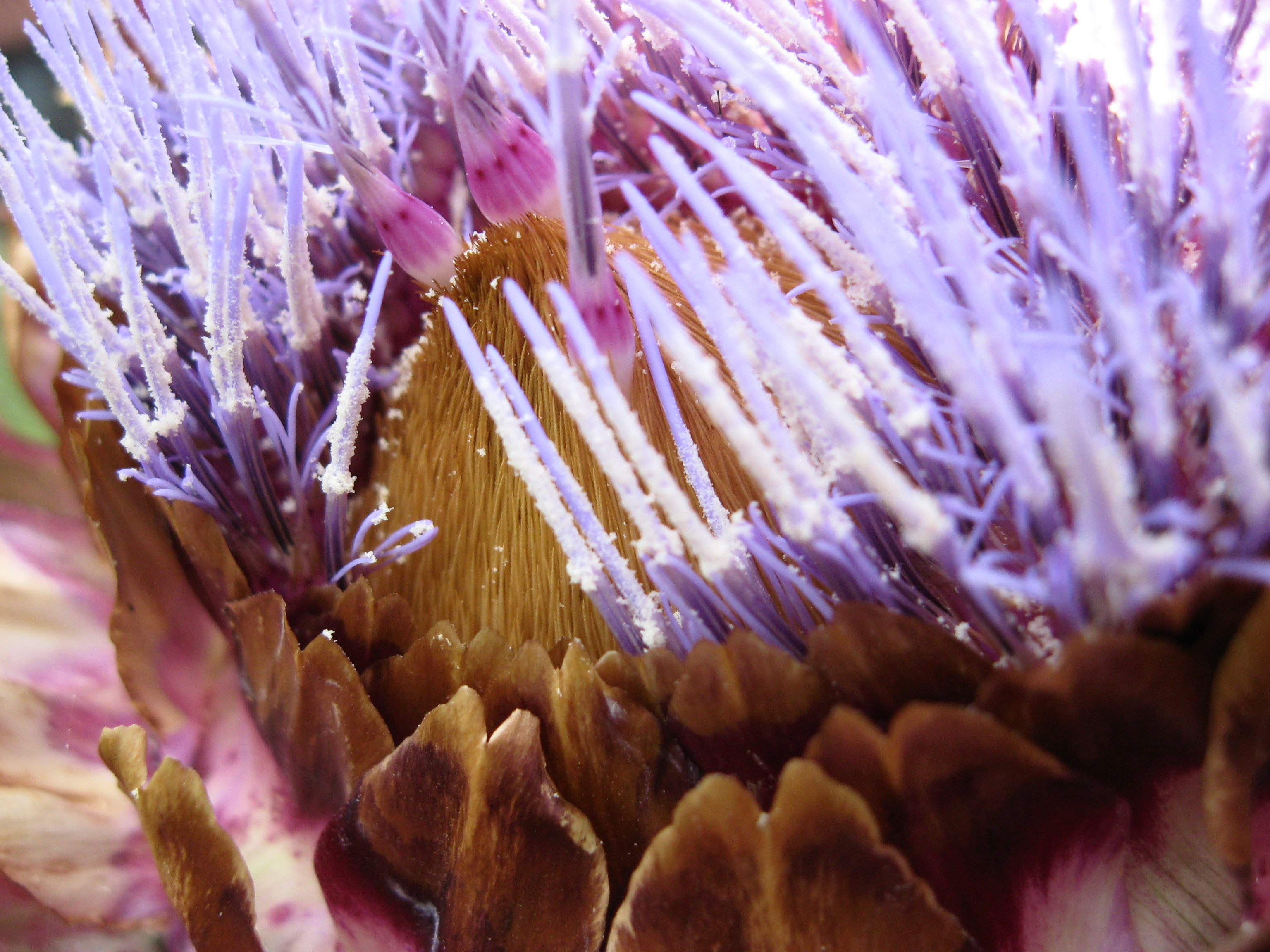 Detail van een artisjokbloem / Detail of artichoke flower